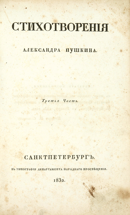 Пушкин, А. Стихотворения Александра Пушкина. В 4 ч. Ч. 3. СПб.: В Тип. Департамента Народного Просвещения, 1832.